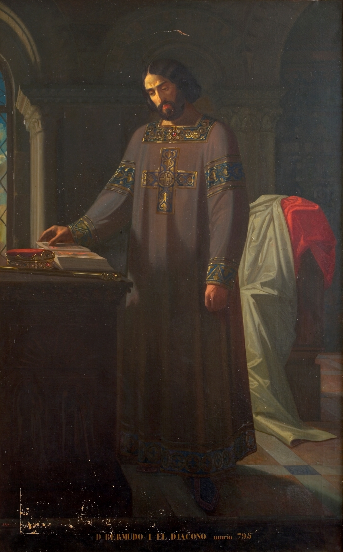 Retrato imaginario de Bermudo I el Diácono († 797), rey de Asturias. Fue hijo de Fruela de Cantabria y hermano del rey Aurelio de Asturias.